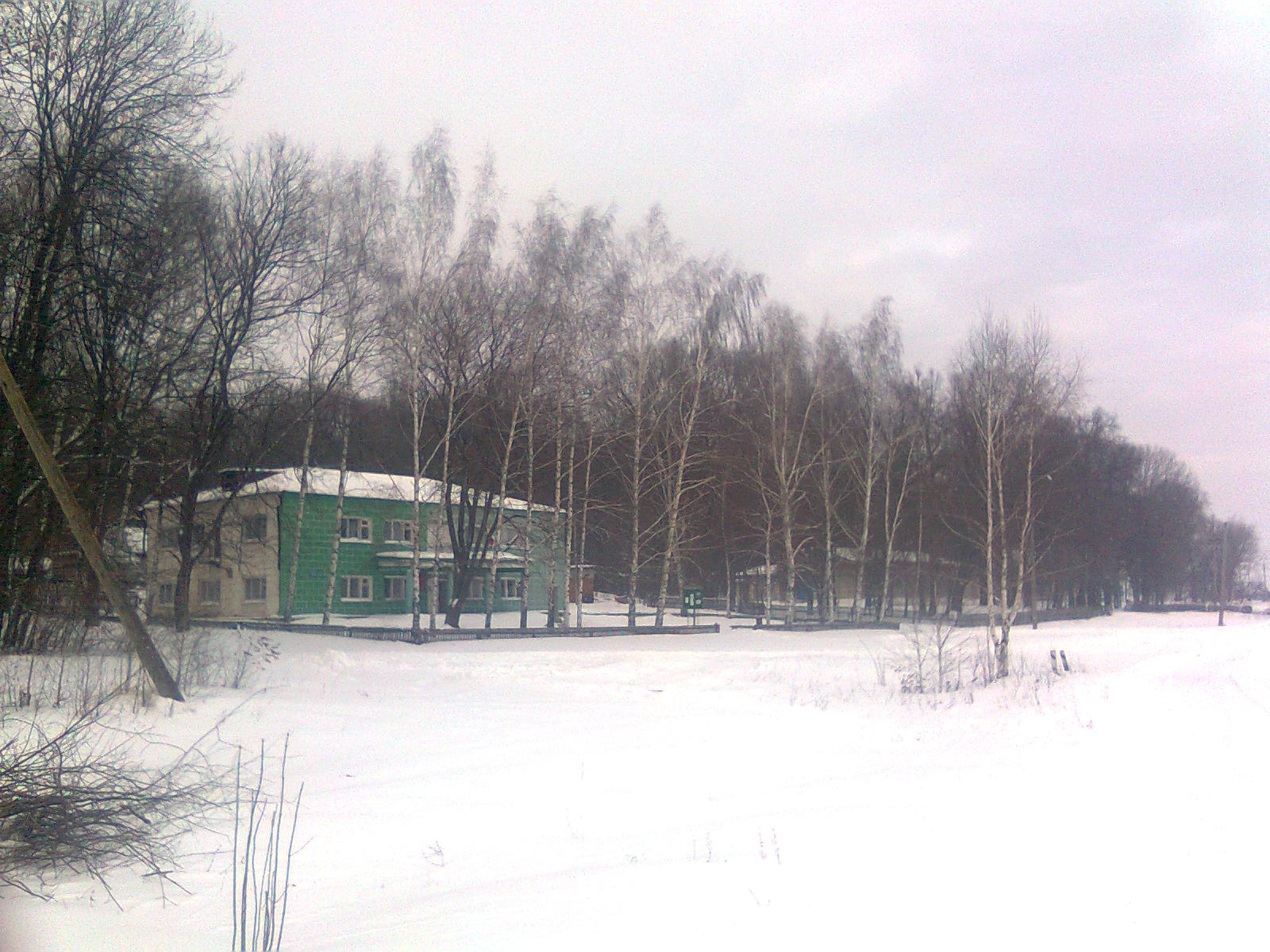 Здание колхозного правления в селе Гагарино Тамбовской области